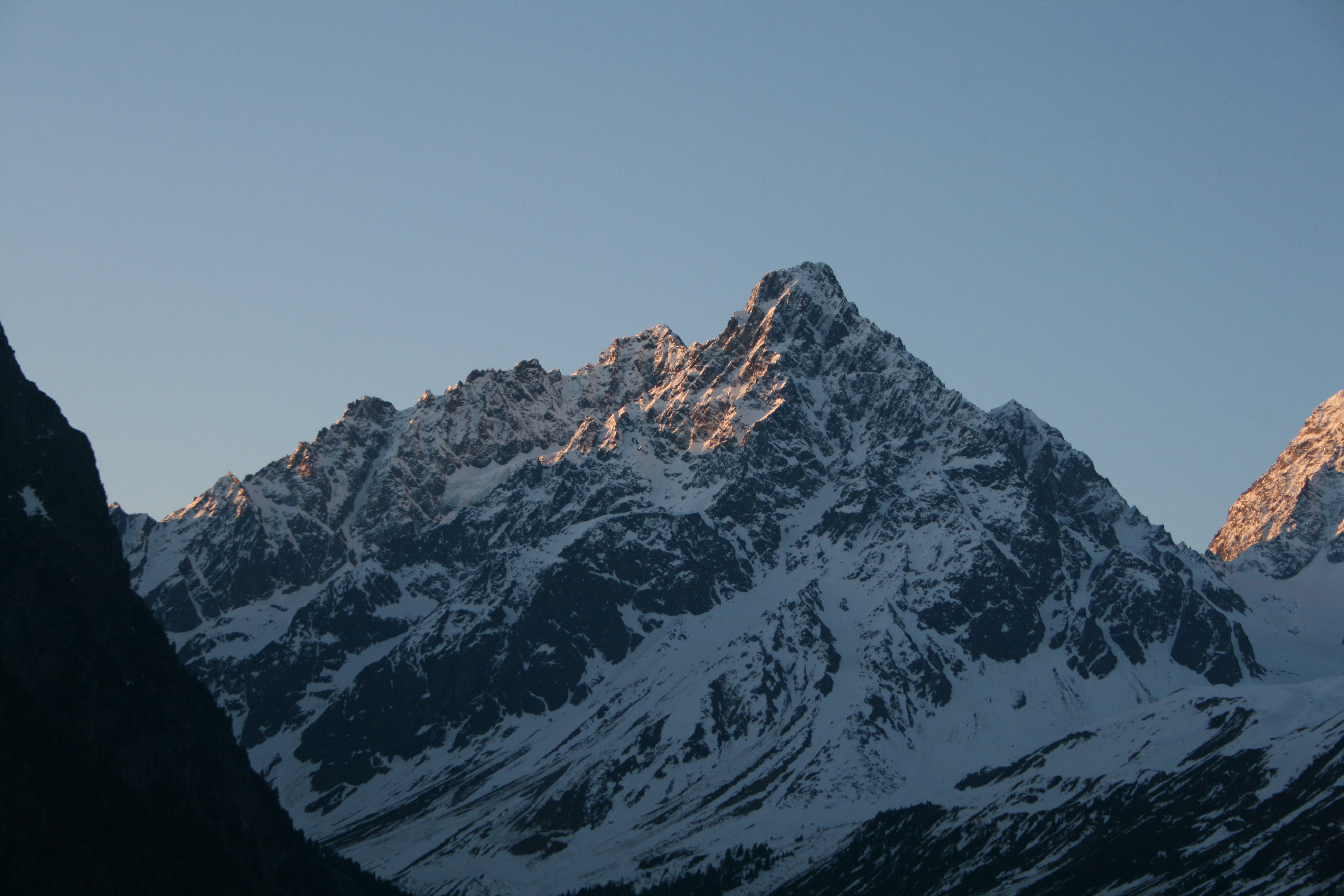 Schwabenkopf von Westen, Langetsbergalm